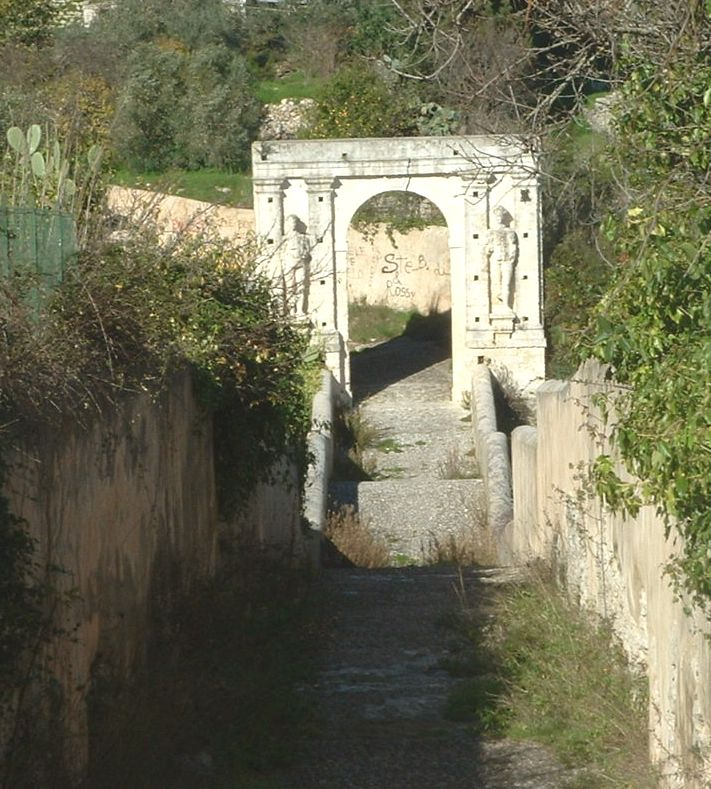 Canicattini Bagni (SR), St. Alfano Bridge